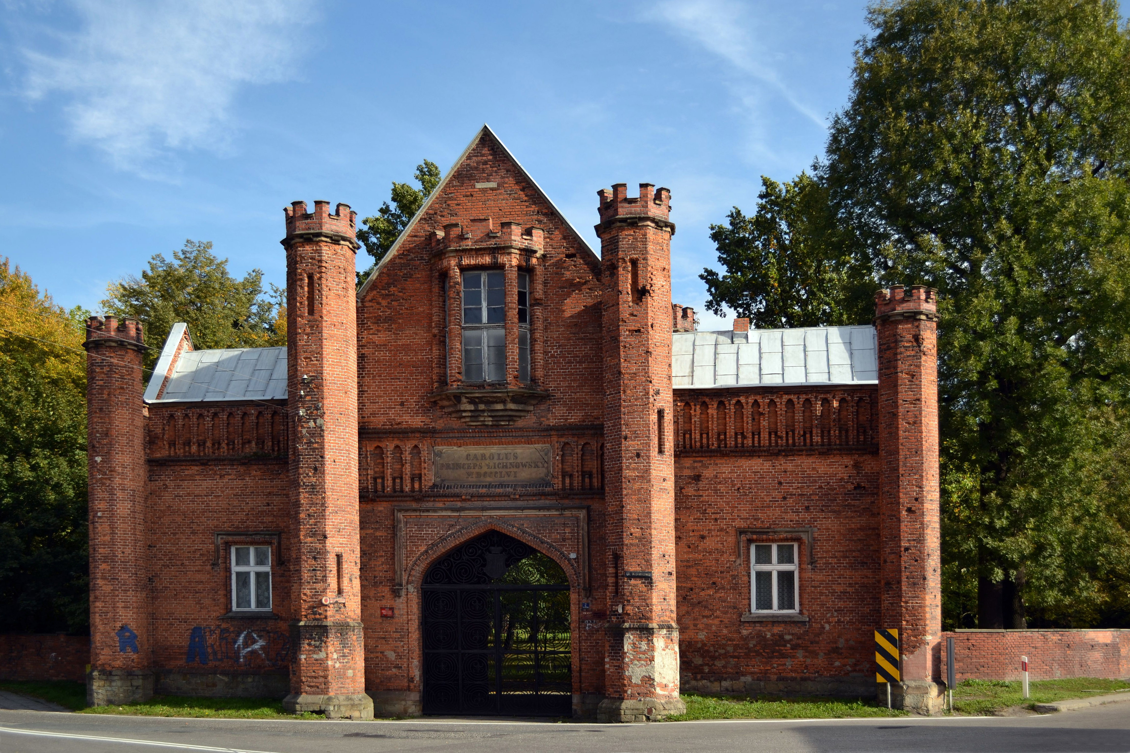 Krzyżanowice, brama, 1856